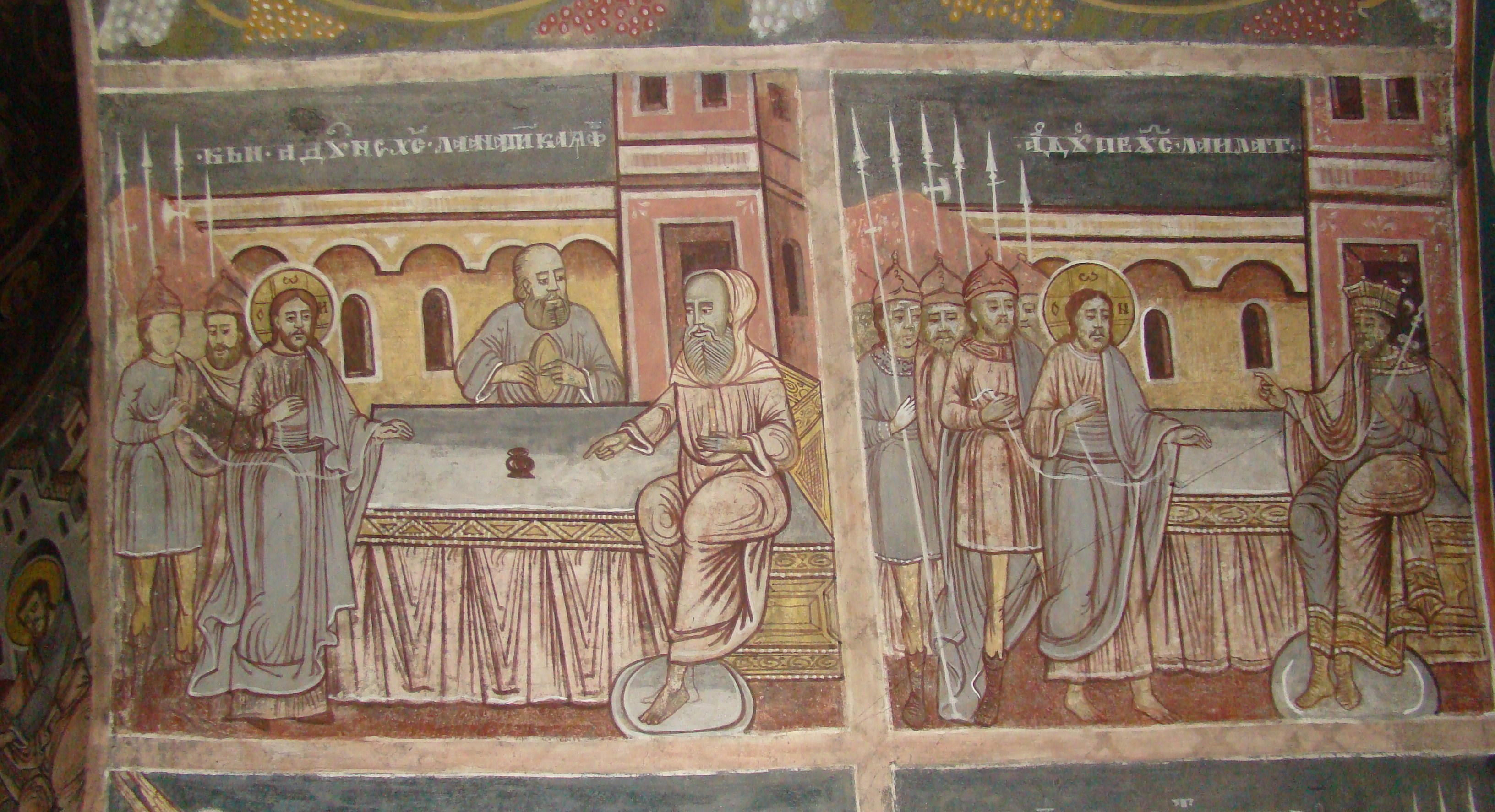 Biserica „Sfânta Treime", sat Vale, oraș Săliște, judet Sibiu